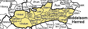 Middelsom Herred Gl Viborg Amt , Denmark. Source: Map by Svend-Erik Christiansen.